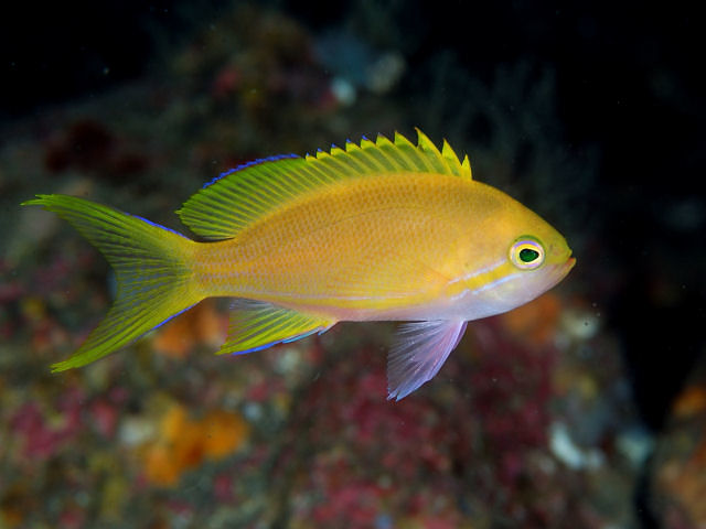 スミレナガハナダイyg Pseudanthias pleurotaenia